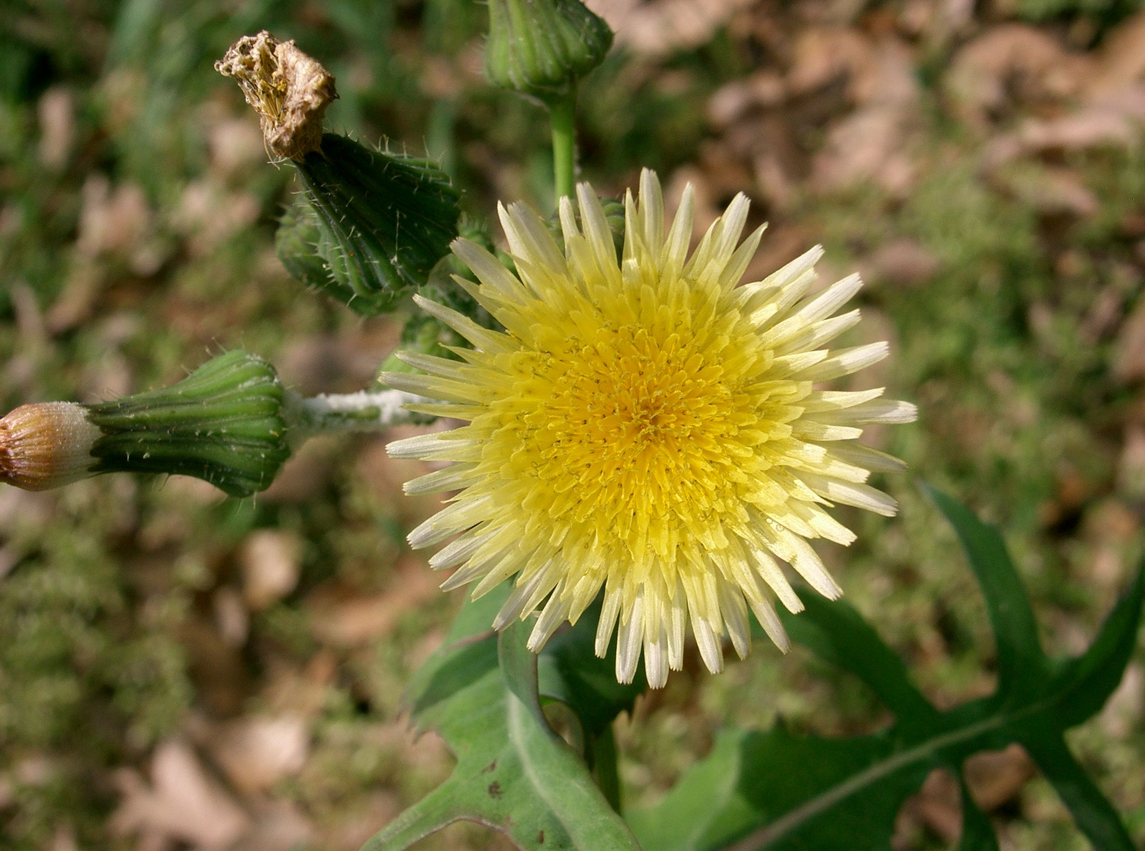 Sonchus oleraceus